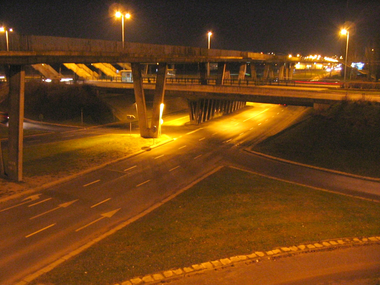 Gdańsk Zaspa 2006 - wiadukt komunikacyjny nocą